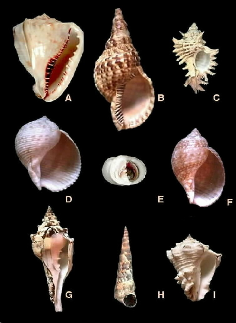 Moluscos del estado Falcón - Venezuela A. Cassis madagascariensis B. Charonia variegata C. Chicoreus brevifrons D. Tonna galea E. Nerita peloronta F. Tonna maculosa G. Turbinella angulata H. Turritella variegata I. Vaasum muricatum